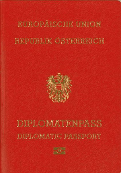 Diplomatenpass, ausgestellt an Personen gem. § 6 PassG 1992